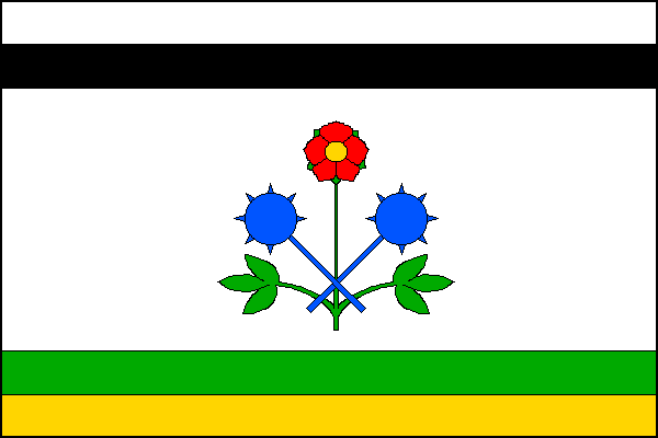 vlajka, Tučín, okres Přerov